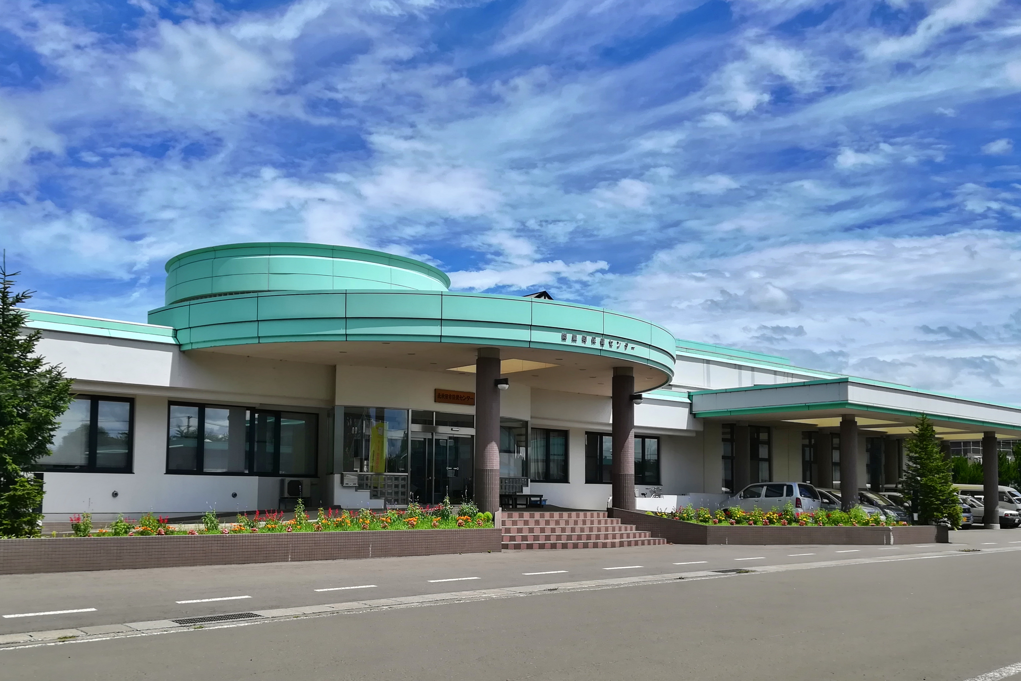 北秋田市保健センター：北秋田市宮前町